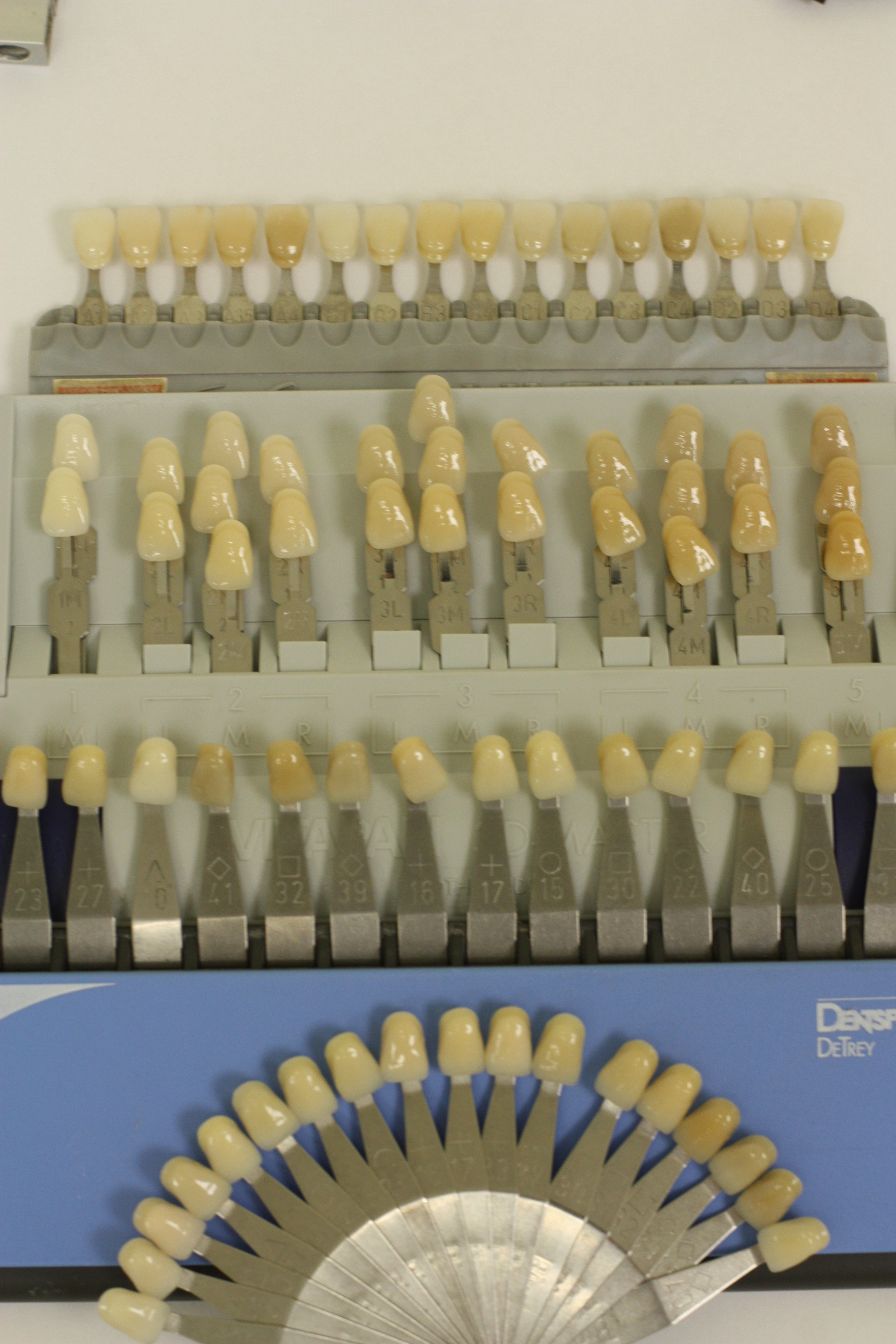 Zahnfarbe Frabring, Zahnfarbbestimmung, Bio-Farbring, VITA-Farbring, Farbring für Composits